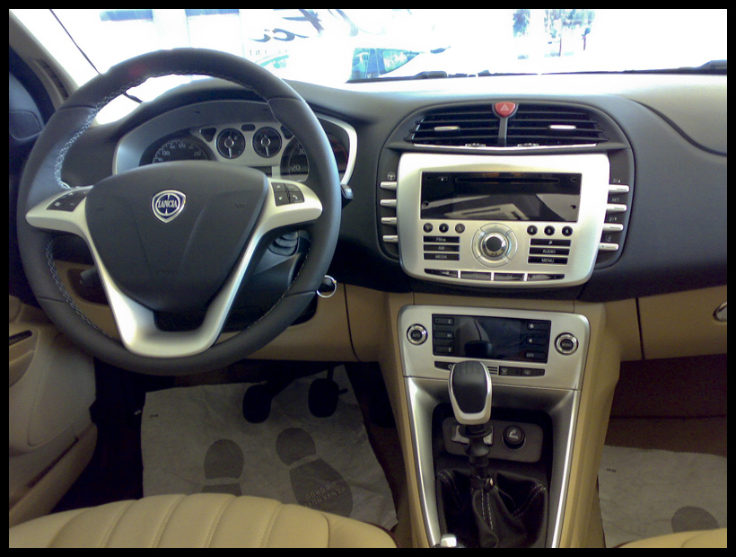 plancia e interni della nuova lancia delta